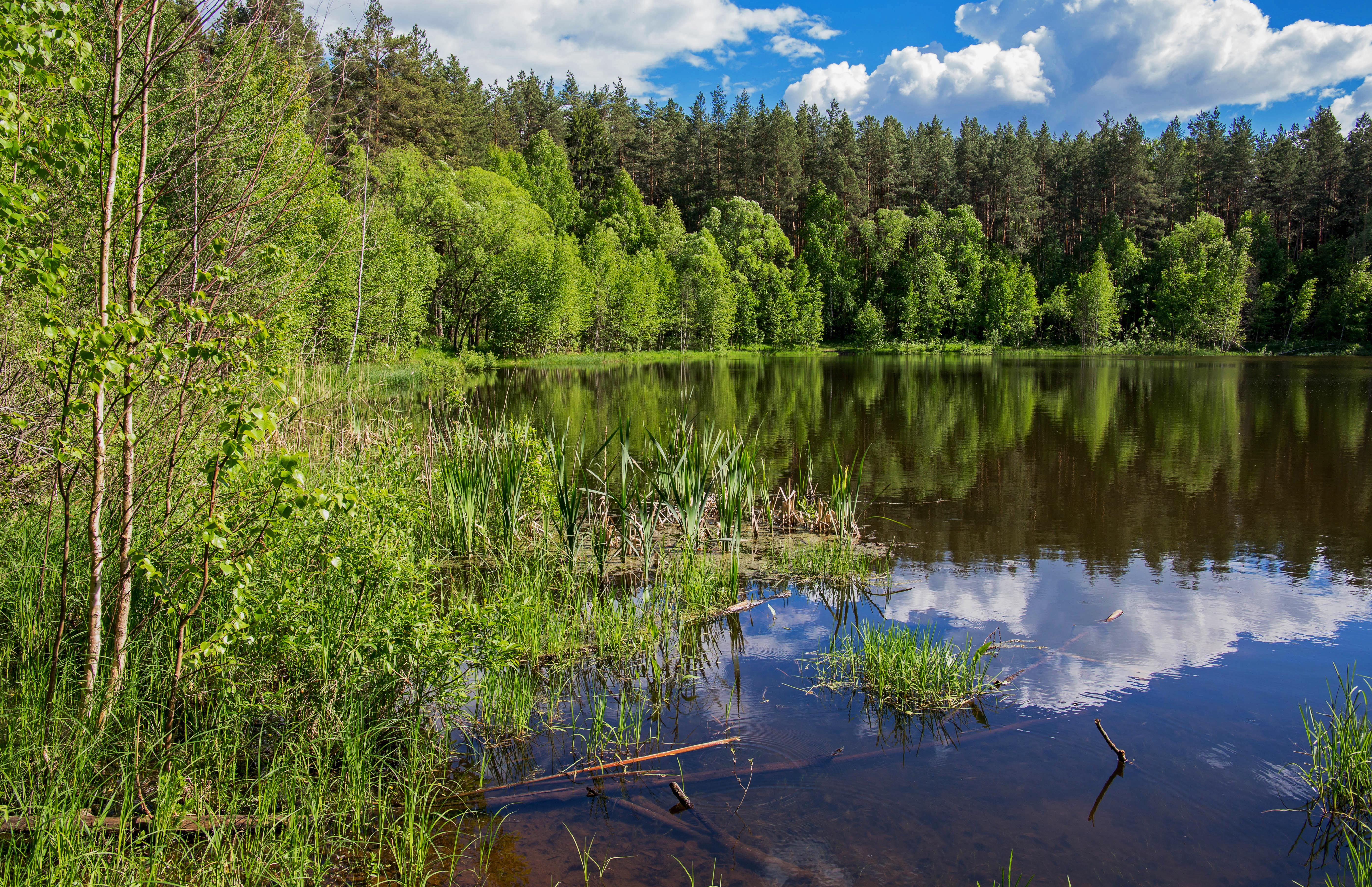 Волжско-Камский заповедник: Зеленодольский район, Татарстан This image is related to the protected area of Russia number 1600082